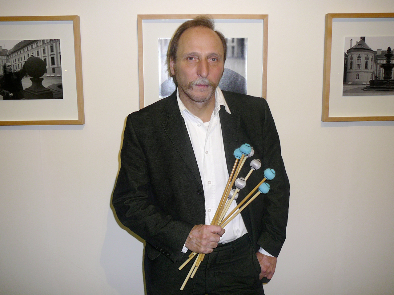 Berndt Luef, Forum Stadtpark Graz; 17.11.2007